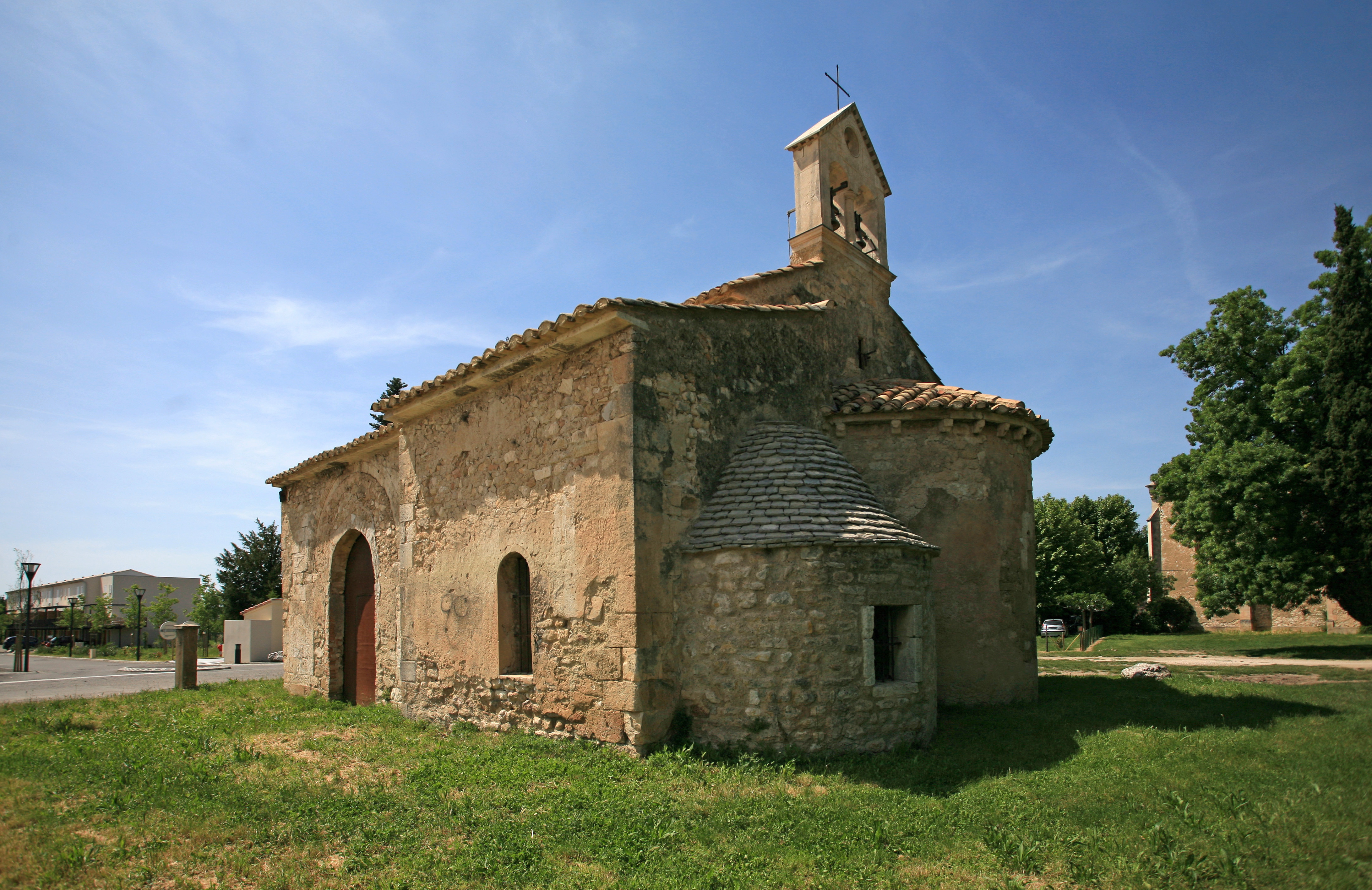 La chapelle des Vignères (commune de Cavaillon, Vaucluse)